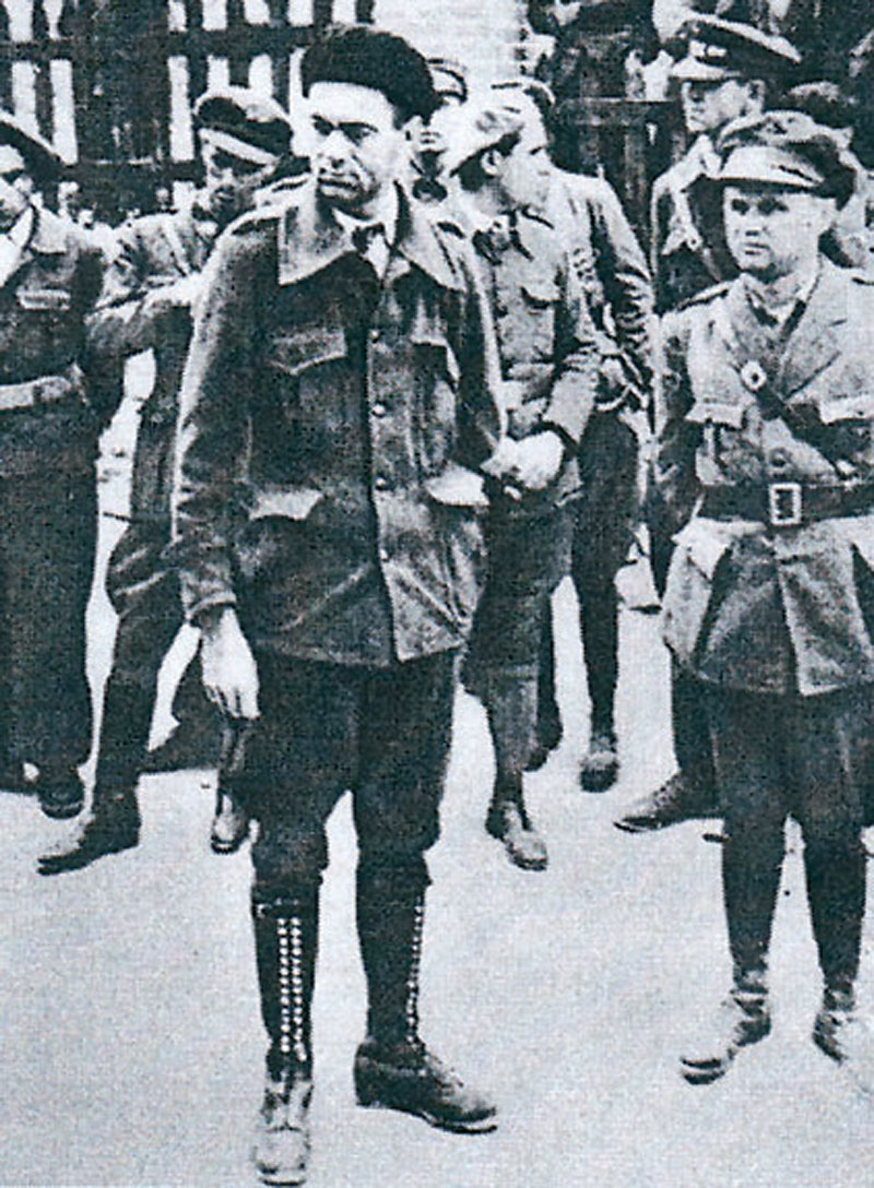 Srpskohrvatski / српскохрватски: Blagoje Parović u Španiji